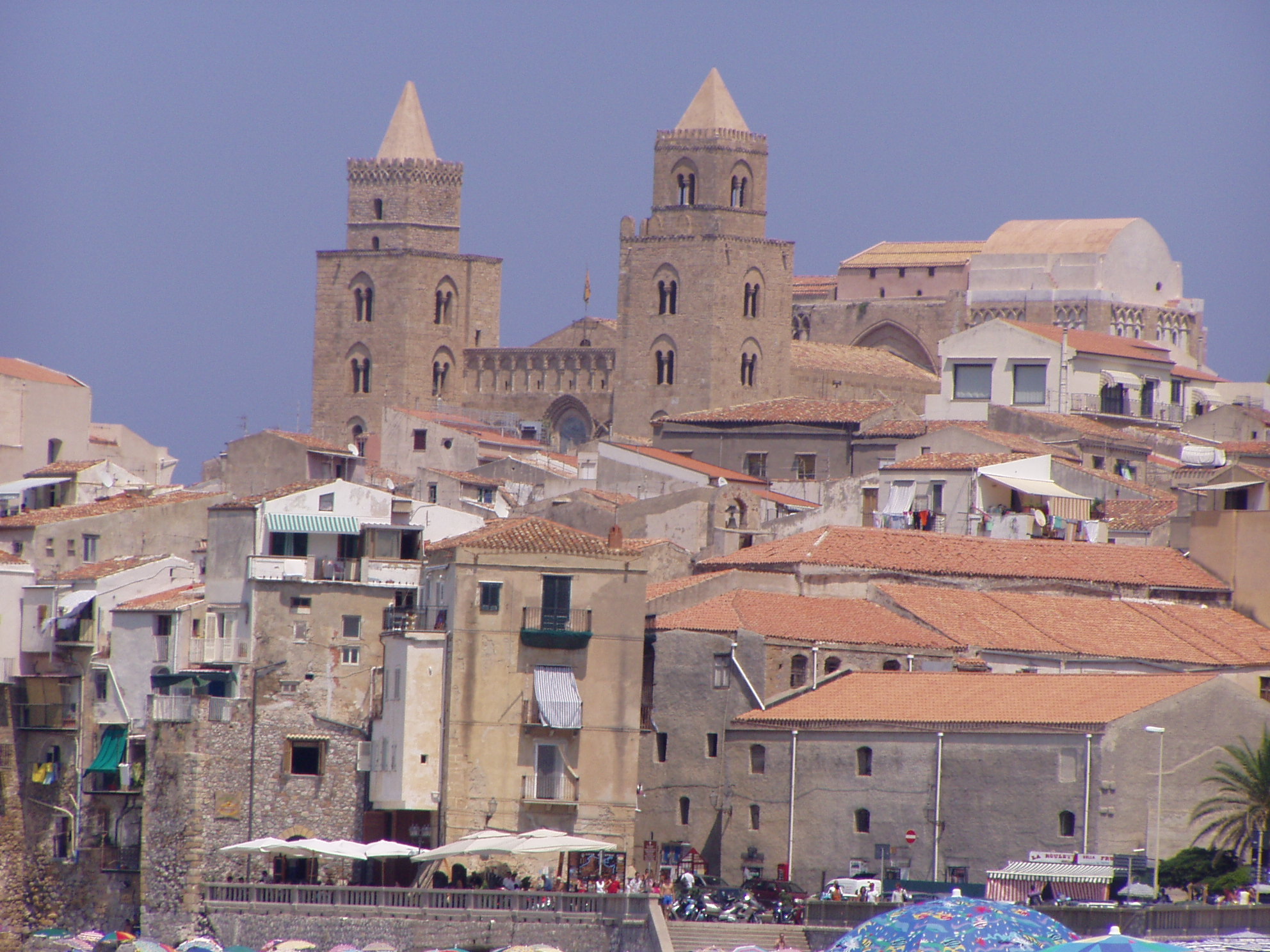 Centro storico di Cefalù.